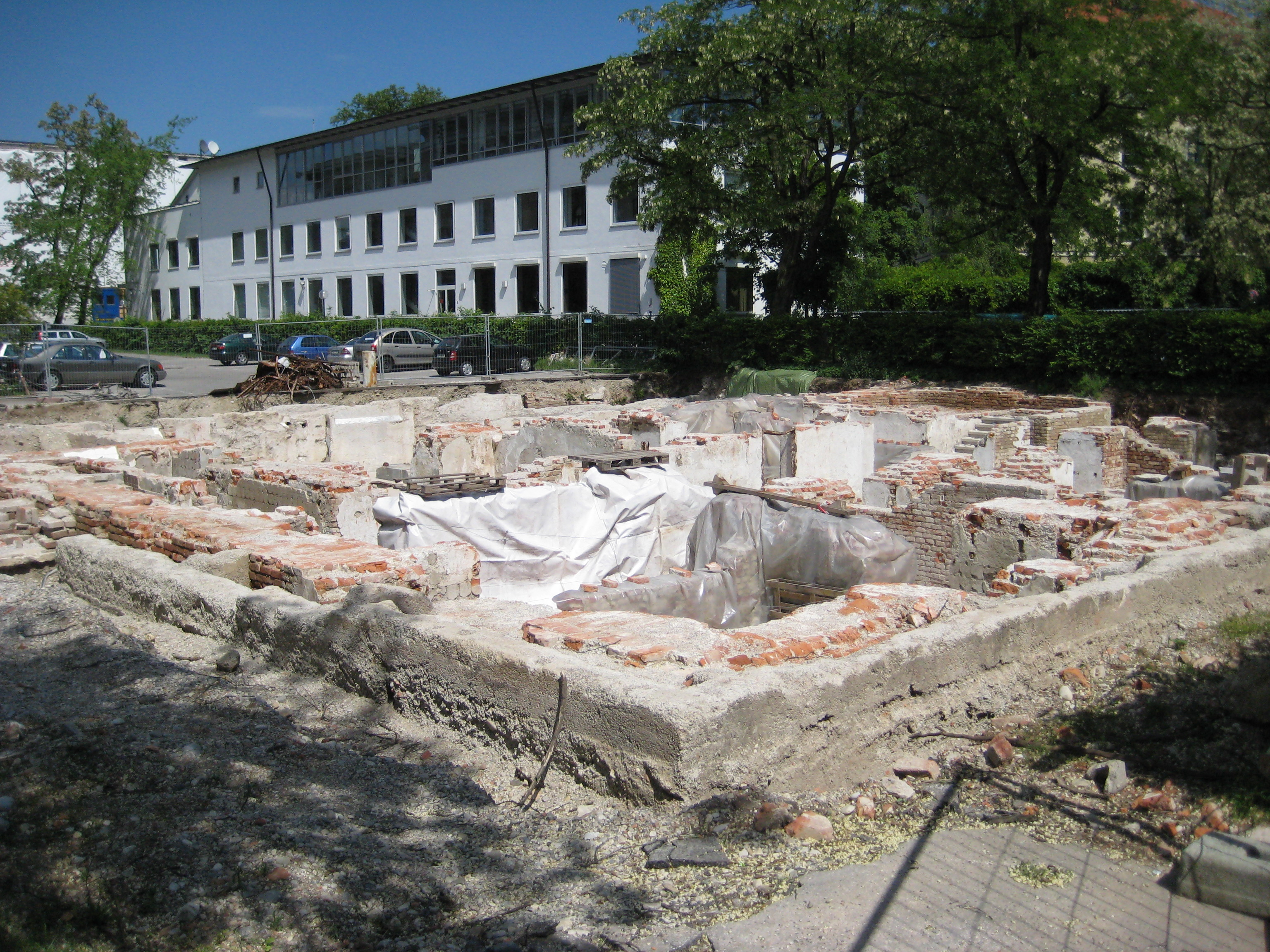 Fundamente des Braunen Hauses in München. Zustand im Mai 2007.